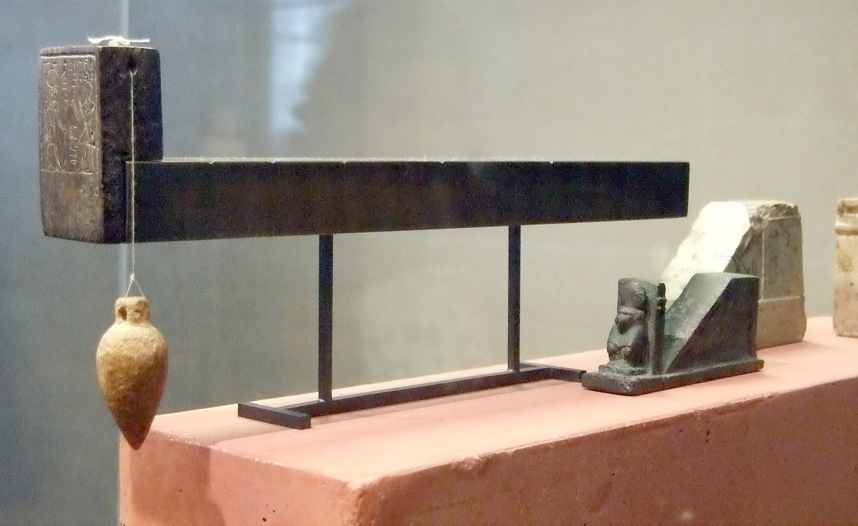 Indicateurs solaires égyptiens du temps du règne d'Amenophis III (-1400), Musée du Louvre, Paris ; sur le talon, représentation de Sothis, la « maîtresse de l'année».